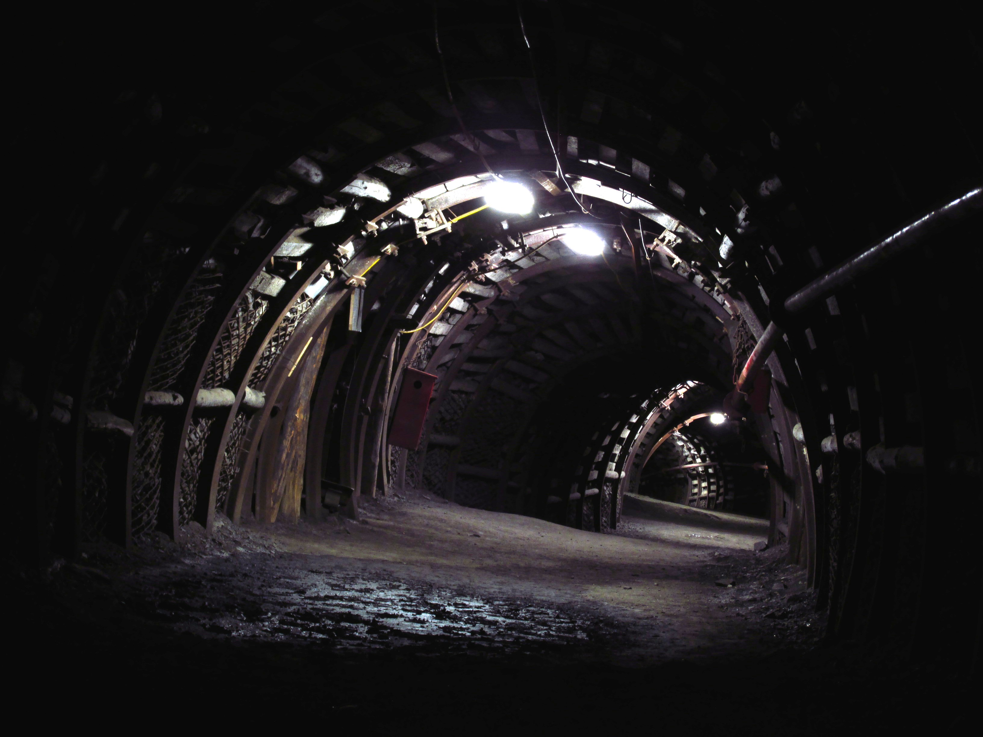 Chodnik podścianowy na poziomie 320.